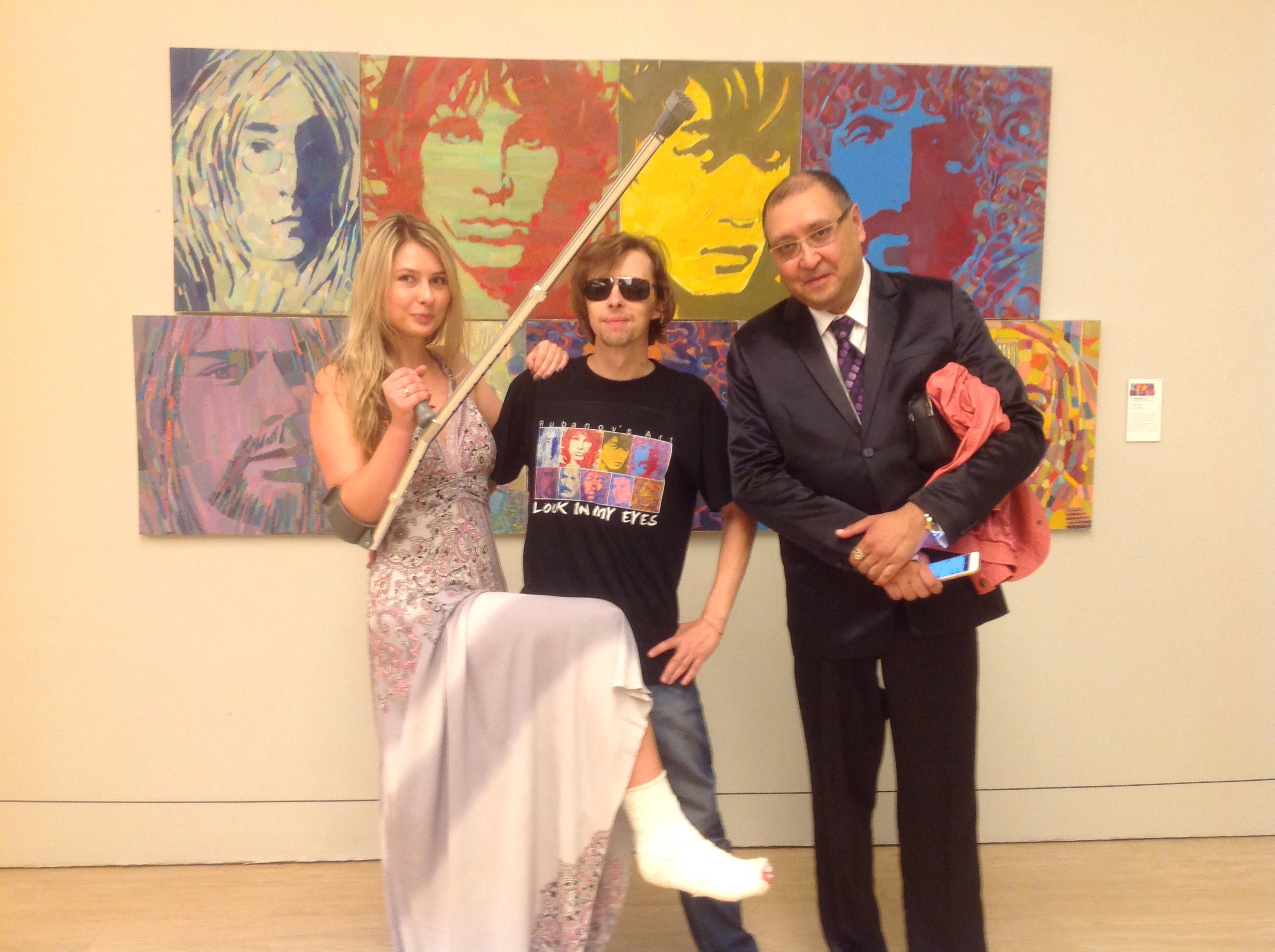 Рубанов Олексій на Пекінському міжнародному арт бієнале 2015.